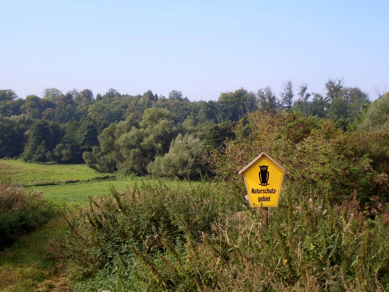 Blick von Nordosten in das Naturschutzgebiet Ostpeene (bei Malchin).